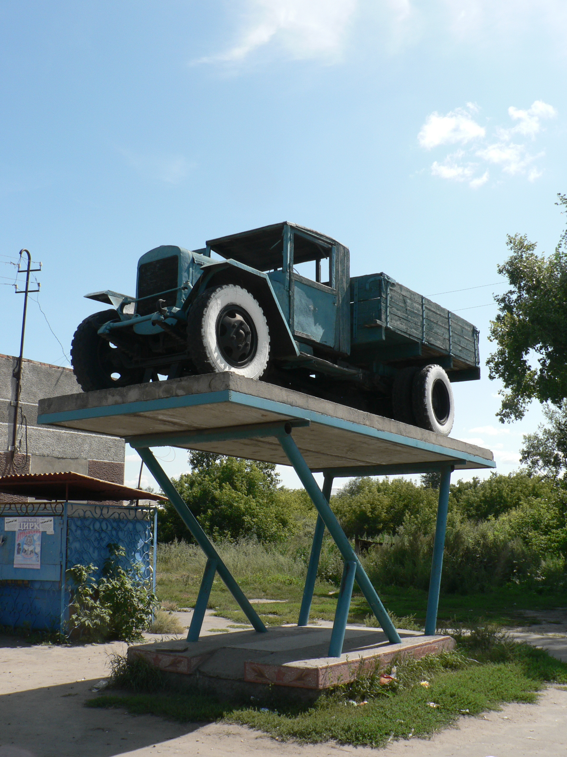 Памятник автомобилю ЗИС-5 в с. Тюменцево